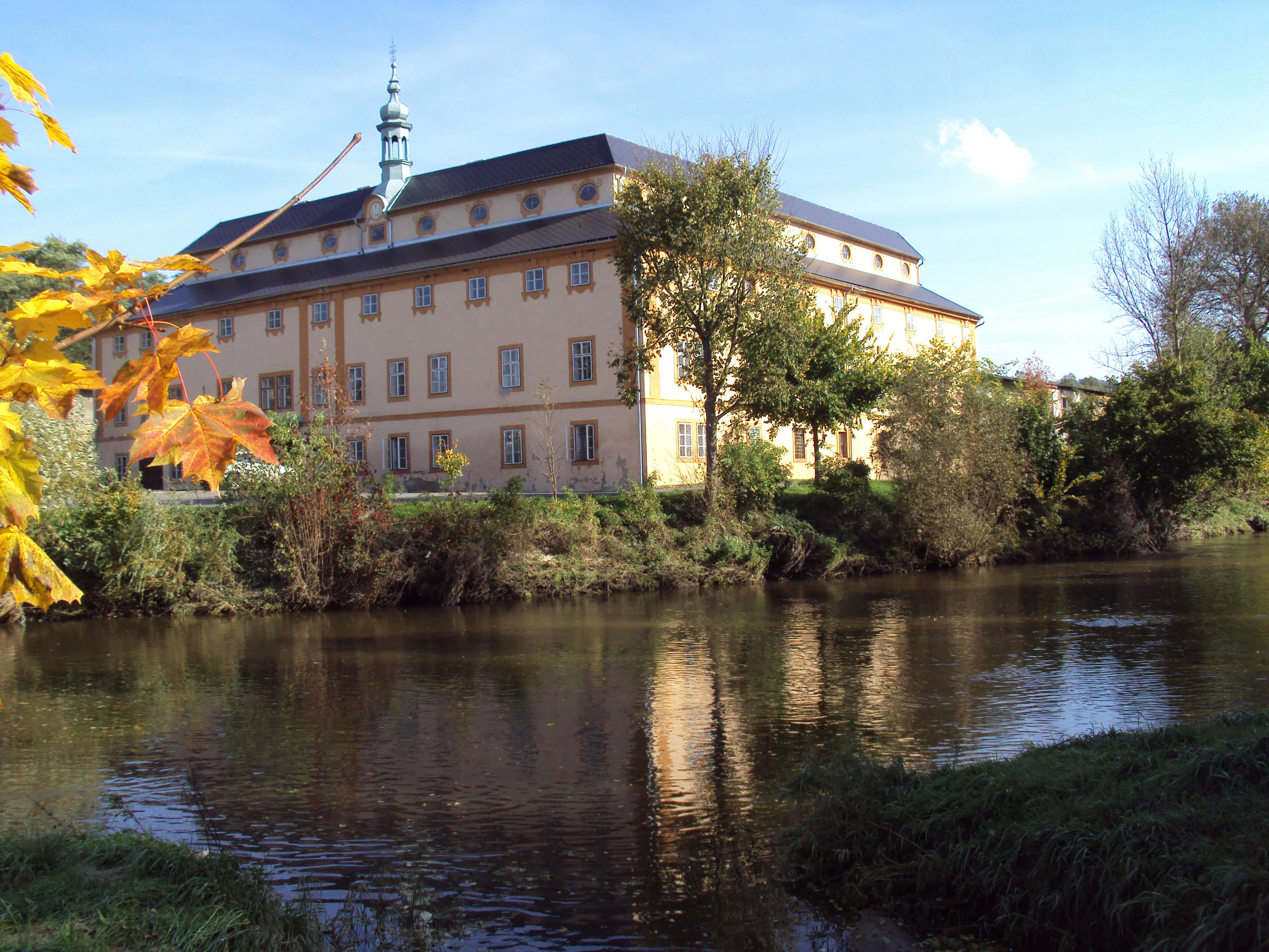 Zámek od Ploučnice, od mostu